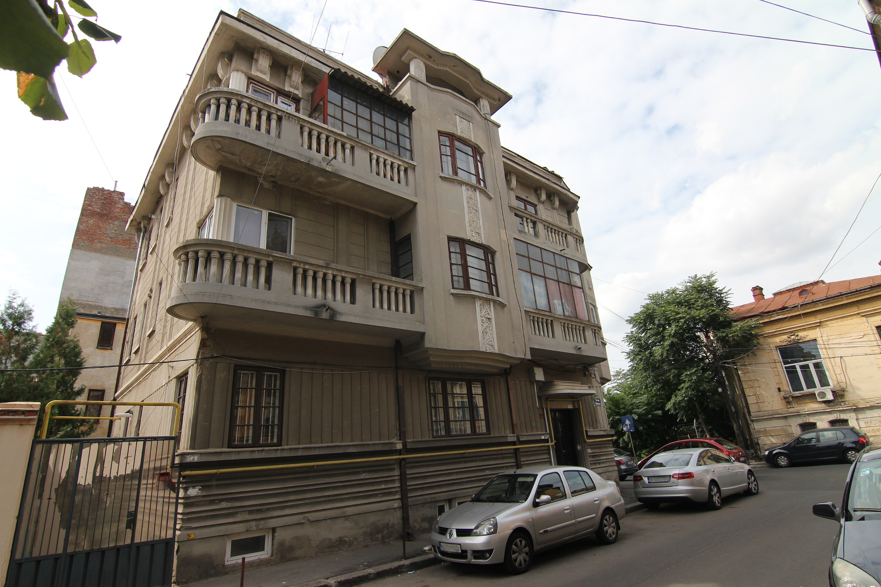 Casă pe Str Romulus